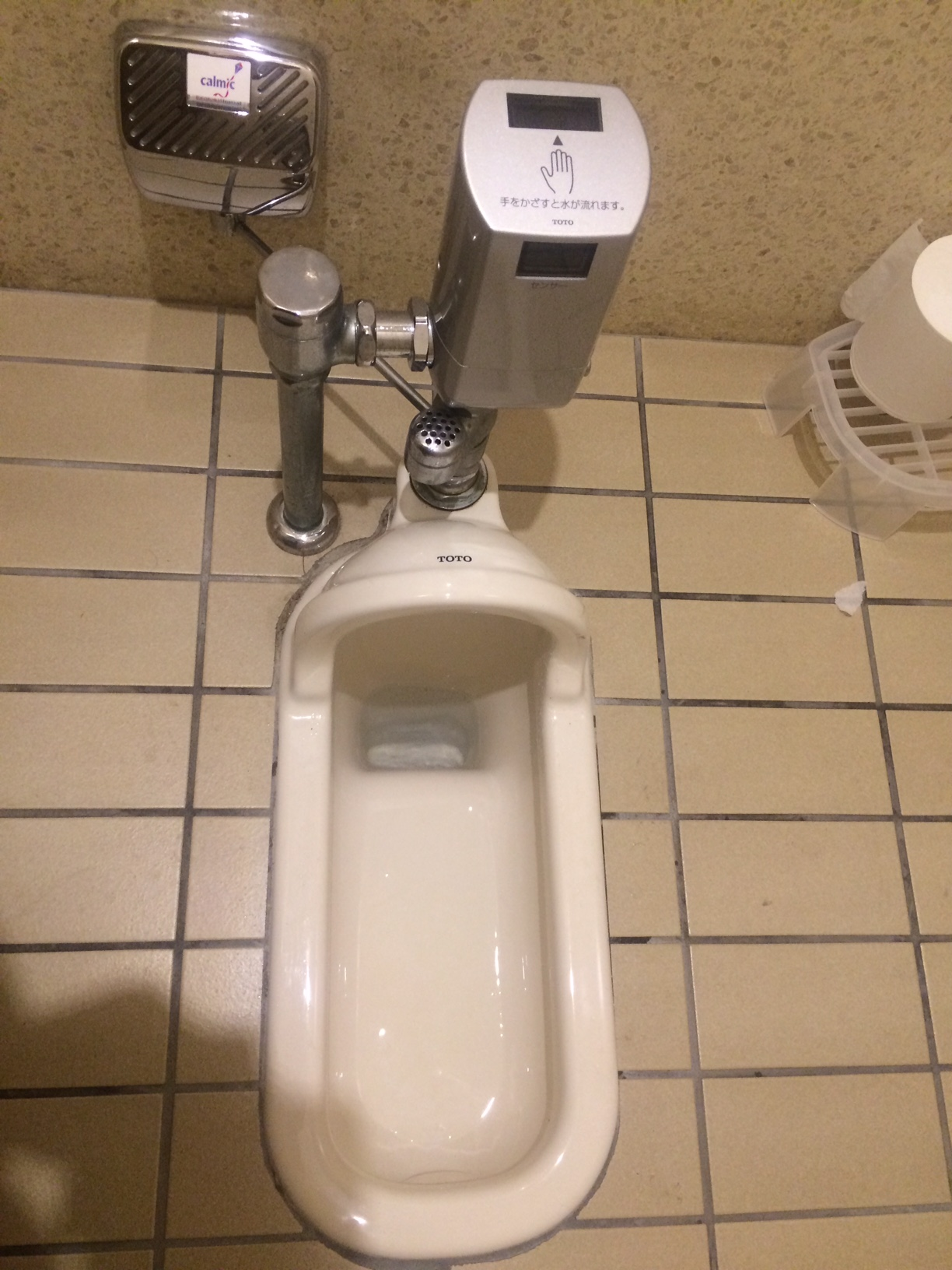 TOTO C375V+Calmic-MK7